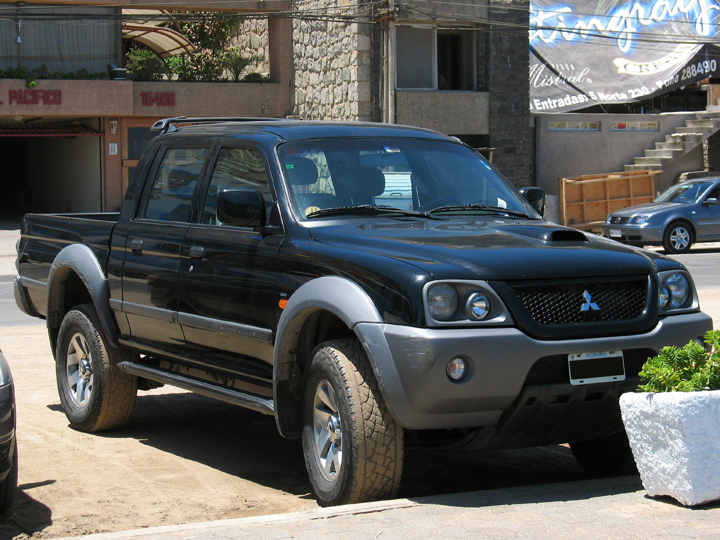 l200 hpe